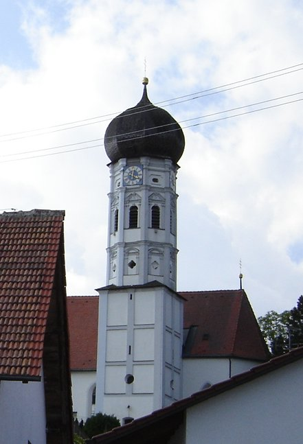 Boarisch: Oiinga Kirch